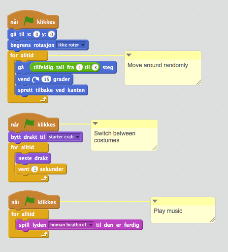 Et skjermdump fra Scratch 2.0 online versjonen